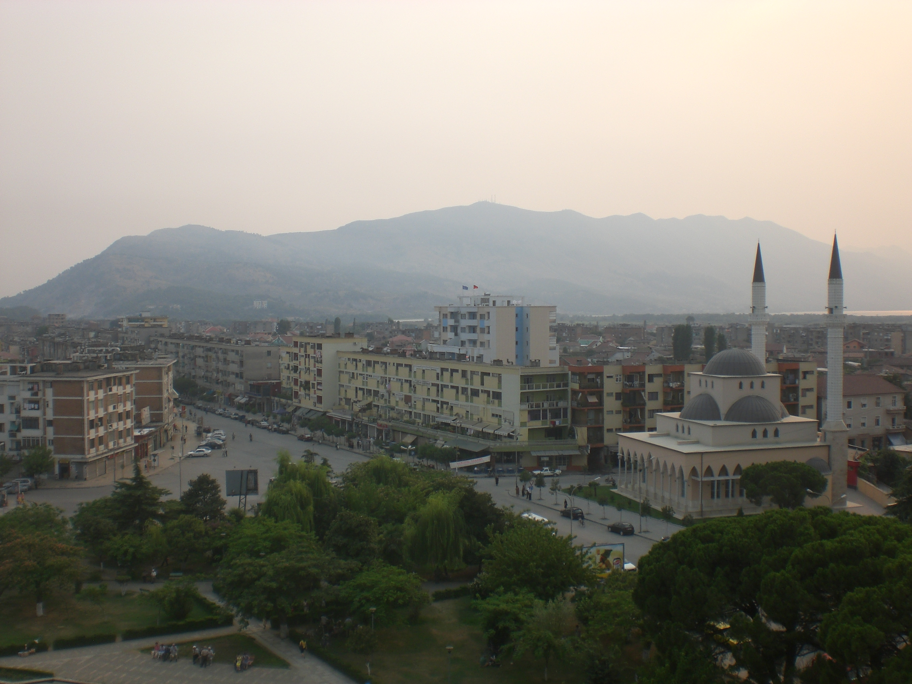 Shkoder's Low Skyline